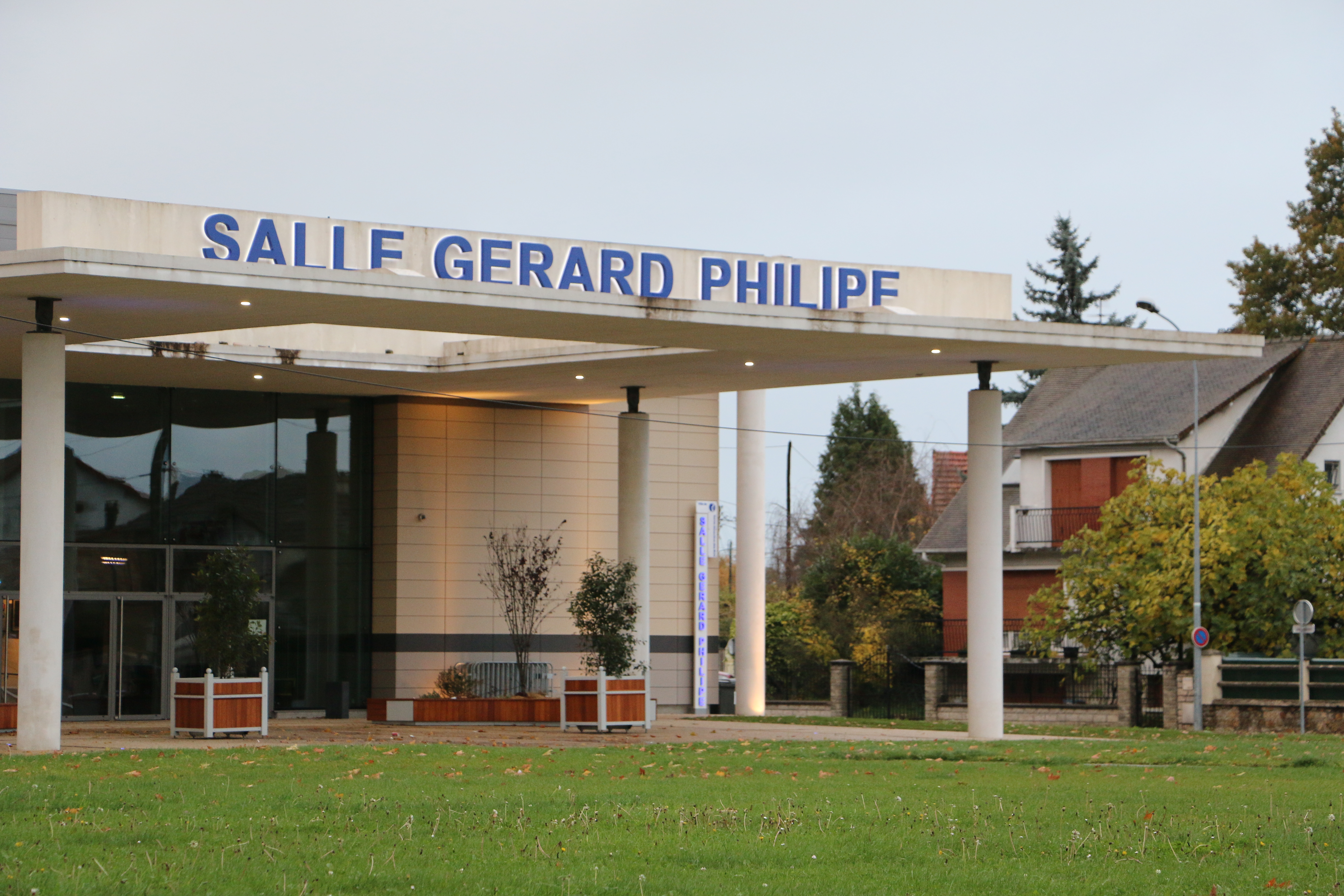 Salle G PHILIPPE